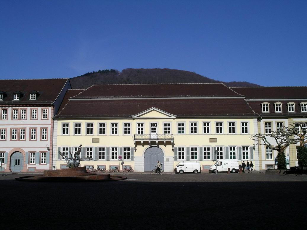 Karlsplatz Heidelberg